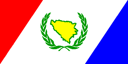 Derde ontwerp.